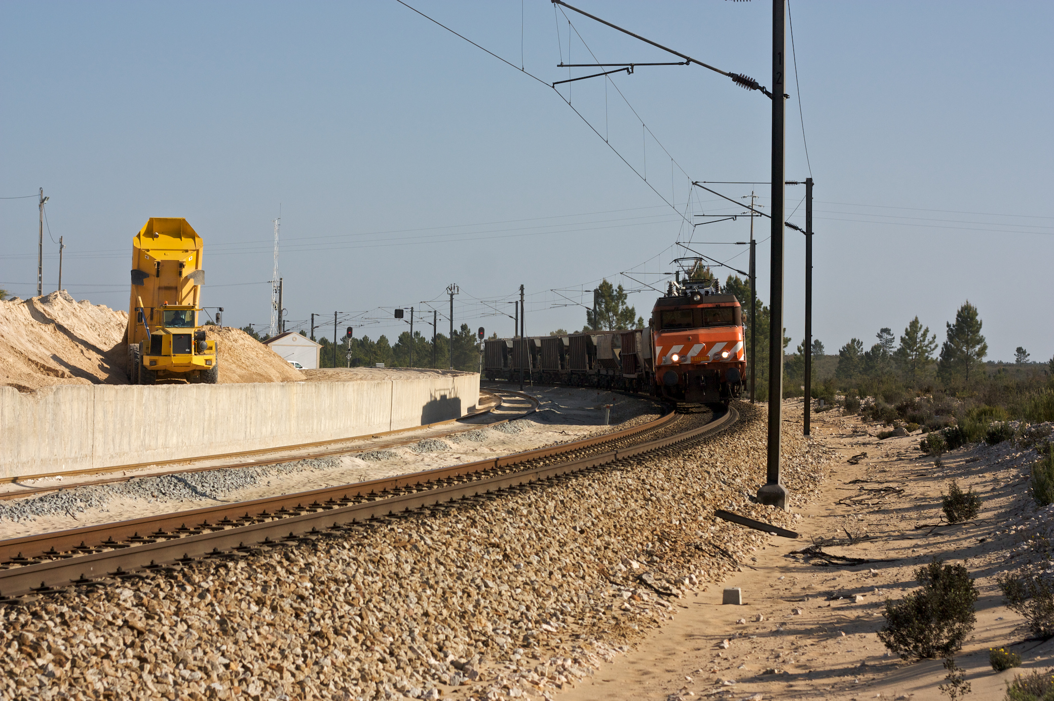 Tipo: Comboio de Transporte de Areia 62394/5 [Entroncamento - Loulé] Local: Estação da Somincor [Linha do Sul, PK 92] Data e hora: 1 de Abril de 2009 [09h34] Material: Locomotiva 2629 + 7 vagões (3 Tranfesa Faoos e 4 CP Falls)